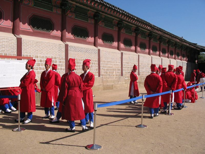 * Date : février 2005 Source : photo personnelle du contributeur Mammique Description : Danseurs se préparant à la danse royale dans le palais de Gyeongbokgung à Séoul en Corée. Licence